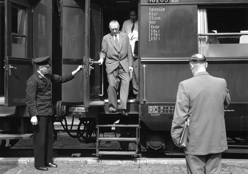 Wahlreise des Bundeskanzlers Dr. Konrad Adenauer im Juli/August 1953 Im Bild: Dr. Konrad Adenauer verläßt den Sonderzug in Braunschweig